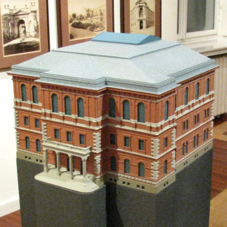 Maketa u Muzeju grada Zagreba - zgrada Hrvatske akademije znanosti i umjetnosti